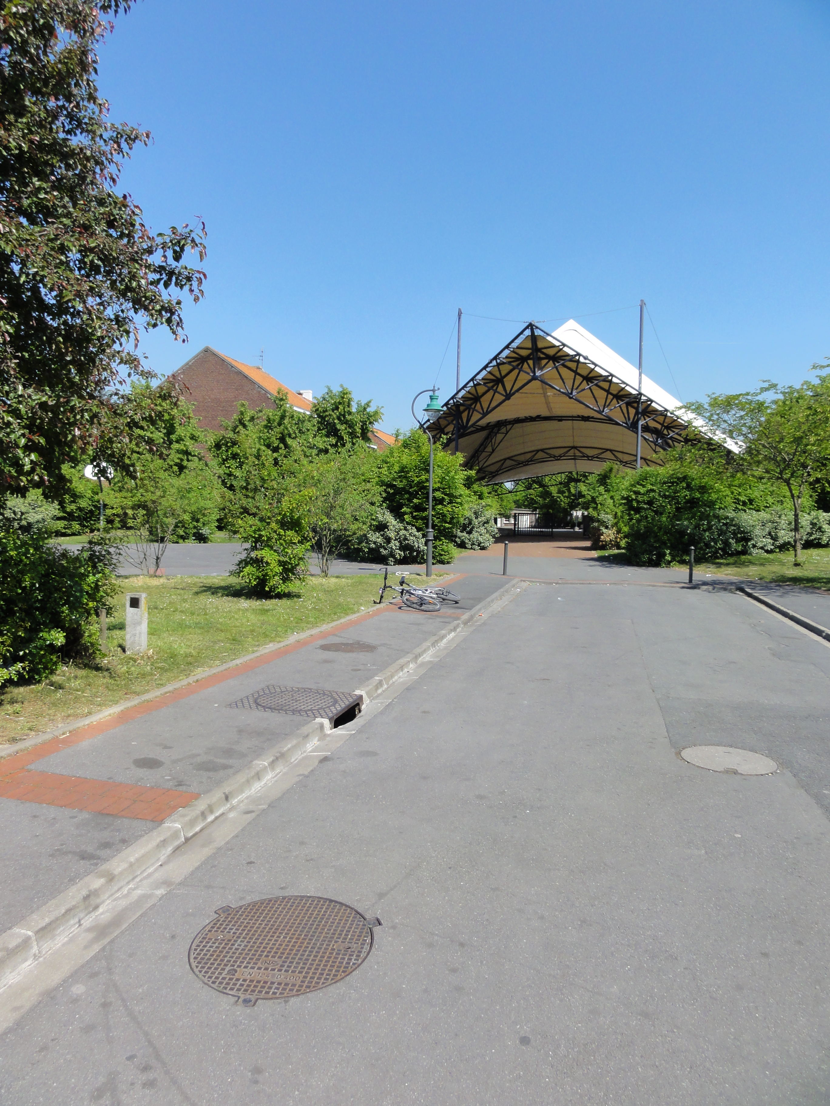 La Fosse Trois Arbres de la Compagnie des mines d'Anzin était un charbonnage constitué de deux puits situé à Vieux-Condé, Nord, Nord-Pas-de-Calais, France.